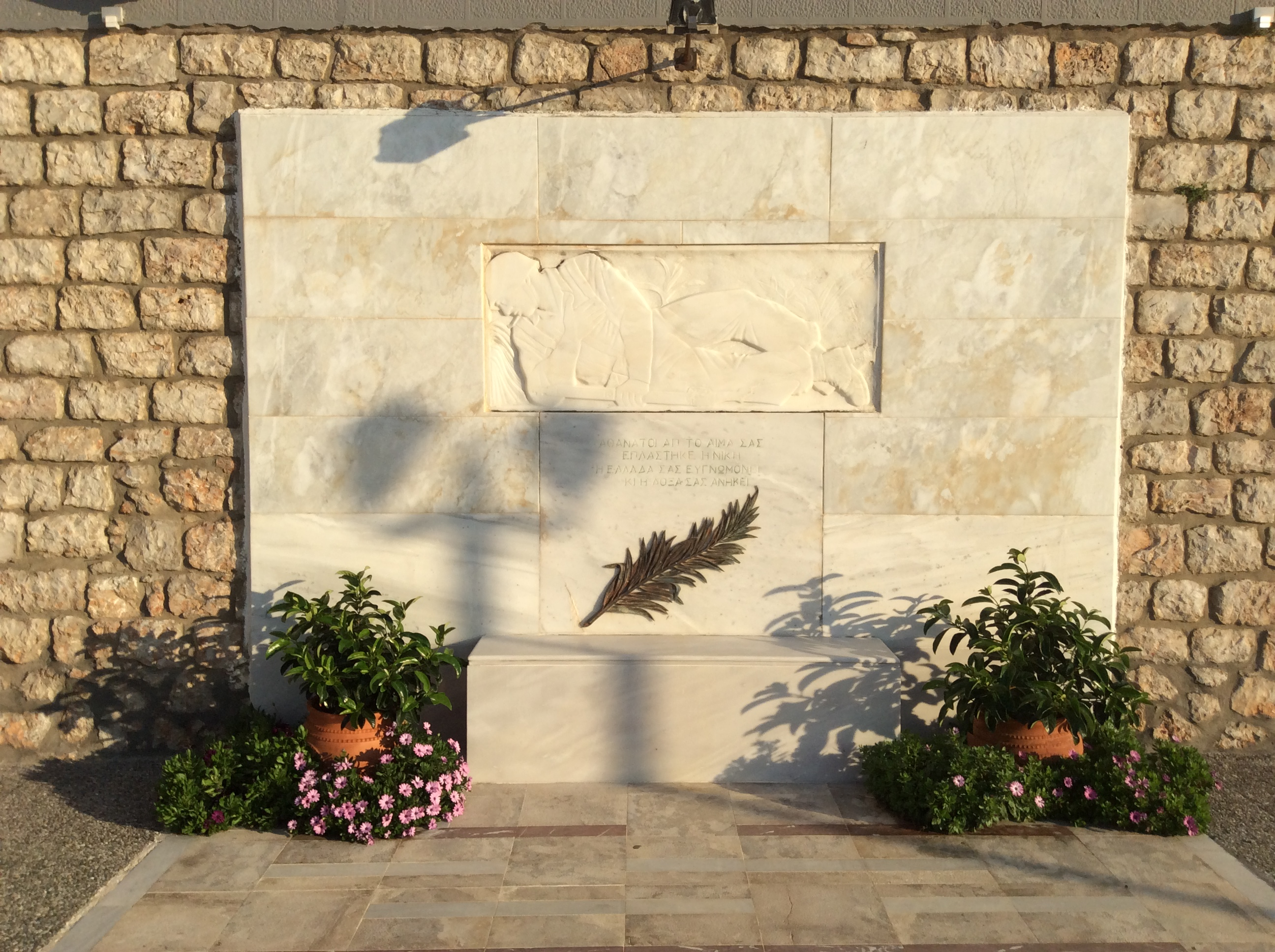 Πύλος - Το Ηρώον μπροστά από το Δημαρχείο Πύλου - Νέστορος.